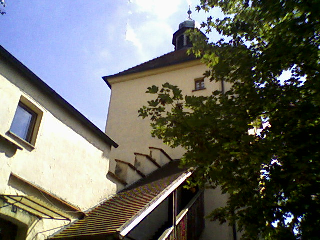 Schwandorfer Blasturm